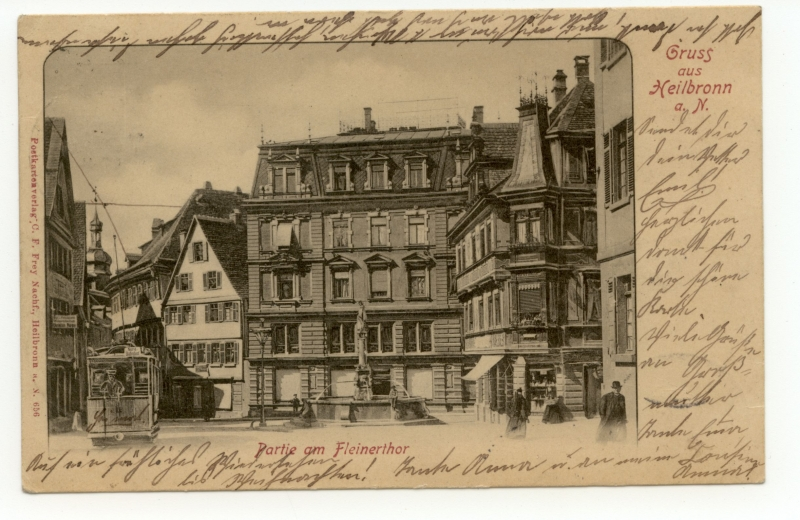 Heilbronn